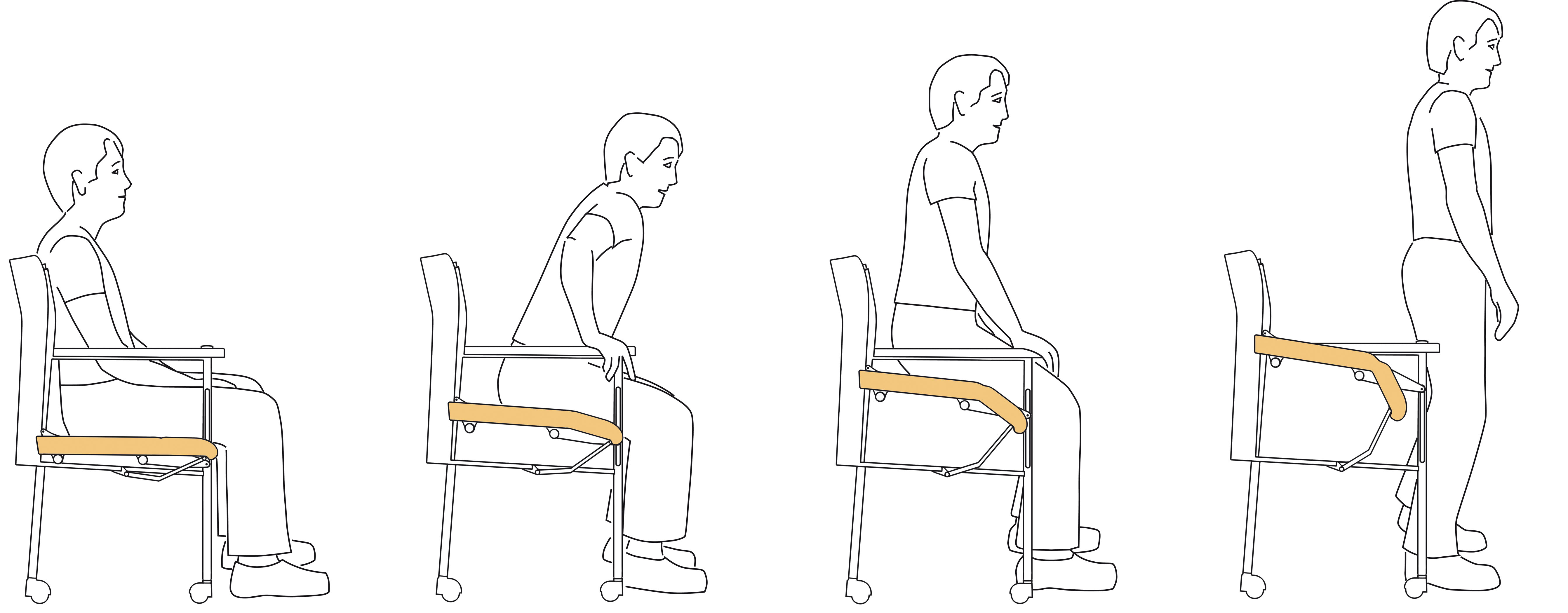 Chelino ist ein Stuhl mit Aufstehhilfe, der das Setzen und Erheben von einem Tisch ohne Kraftanstrengung ermöglicht und dabei völlig ohne Stromversorgung auskommt. Durch Betätigung der Druckknöpfe an den Armlehnen wird der innerhalb der Stuhlbeine befindliche pneumatische Hebemechanismus aktiviert und man wird sanft auf gewünschte Sitzhöhe abgesenkt bzw. beim Aufstehen angehoben.